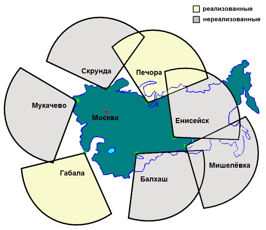 Приблизительная схема зон действия РЛС «Дарьял» советской СПРН.